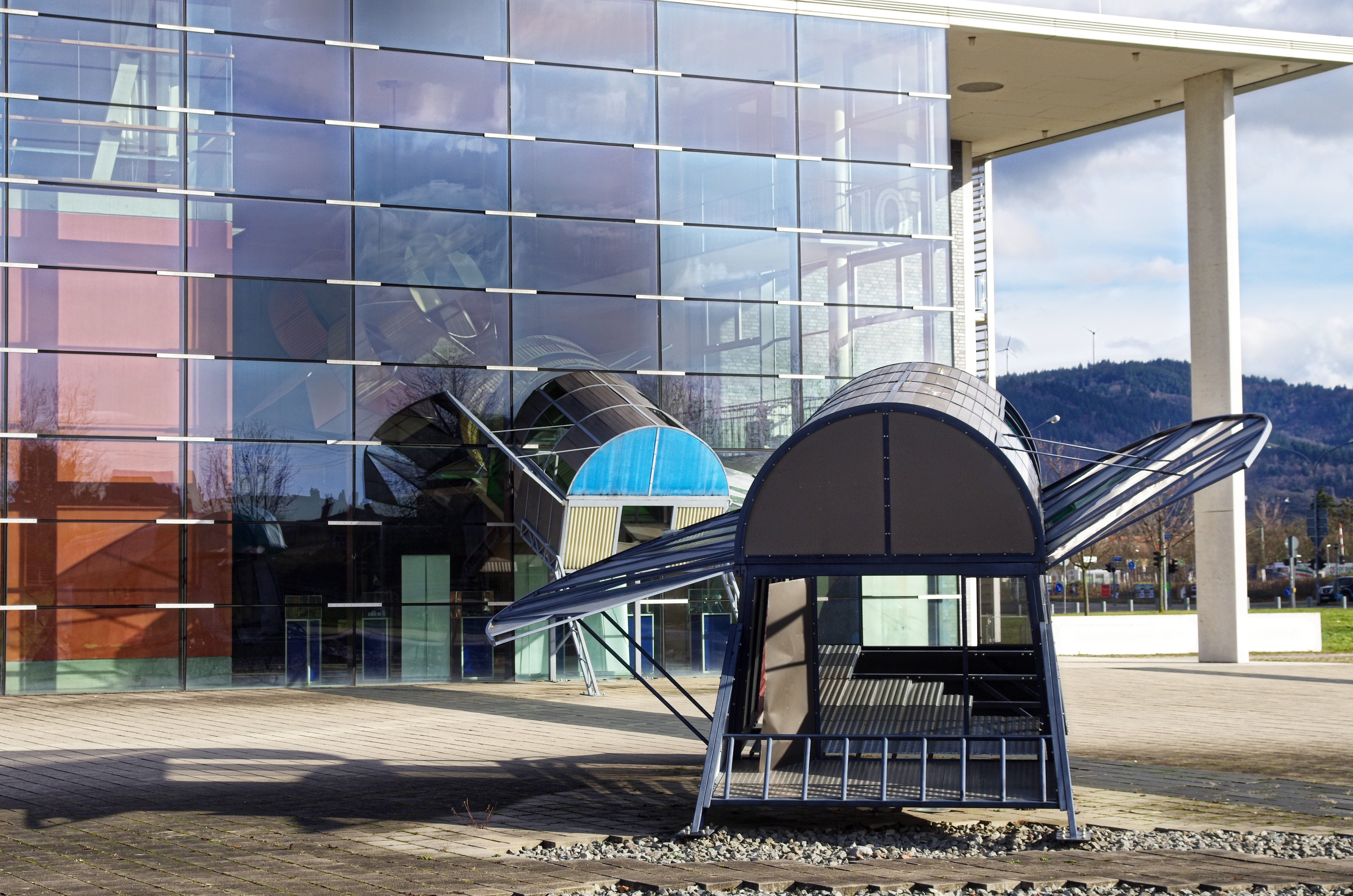 Jump and Twist (1999) von Dennis Oppenheim am Neubau der 15. Fakultät Besteht aus 3 Elementen und stellt einen Übergang zwischen Außen- und Innenraum dar Die erste, bauwagenähnliche „Unit“ weist schräg auf die Glasfront, die zweite durchbricht die Fassade, während die dritte transparent im Innenraum schwebt und rotiert.